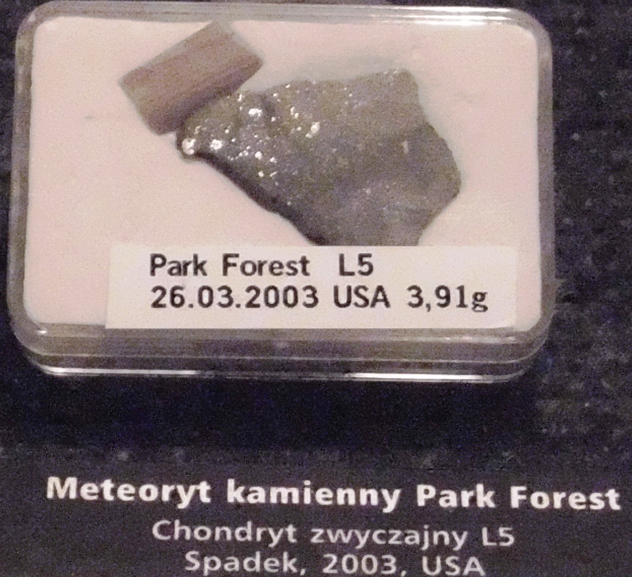 Meteoryt Park Forest